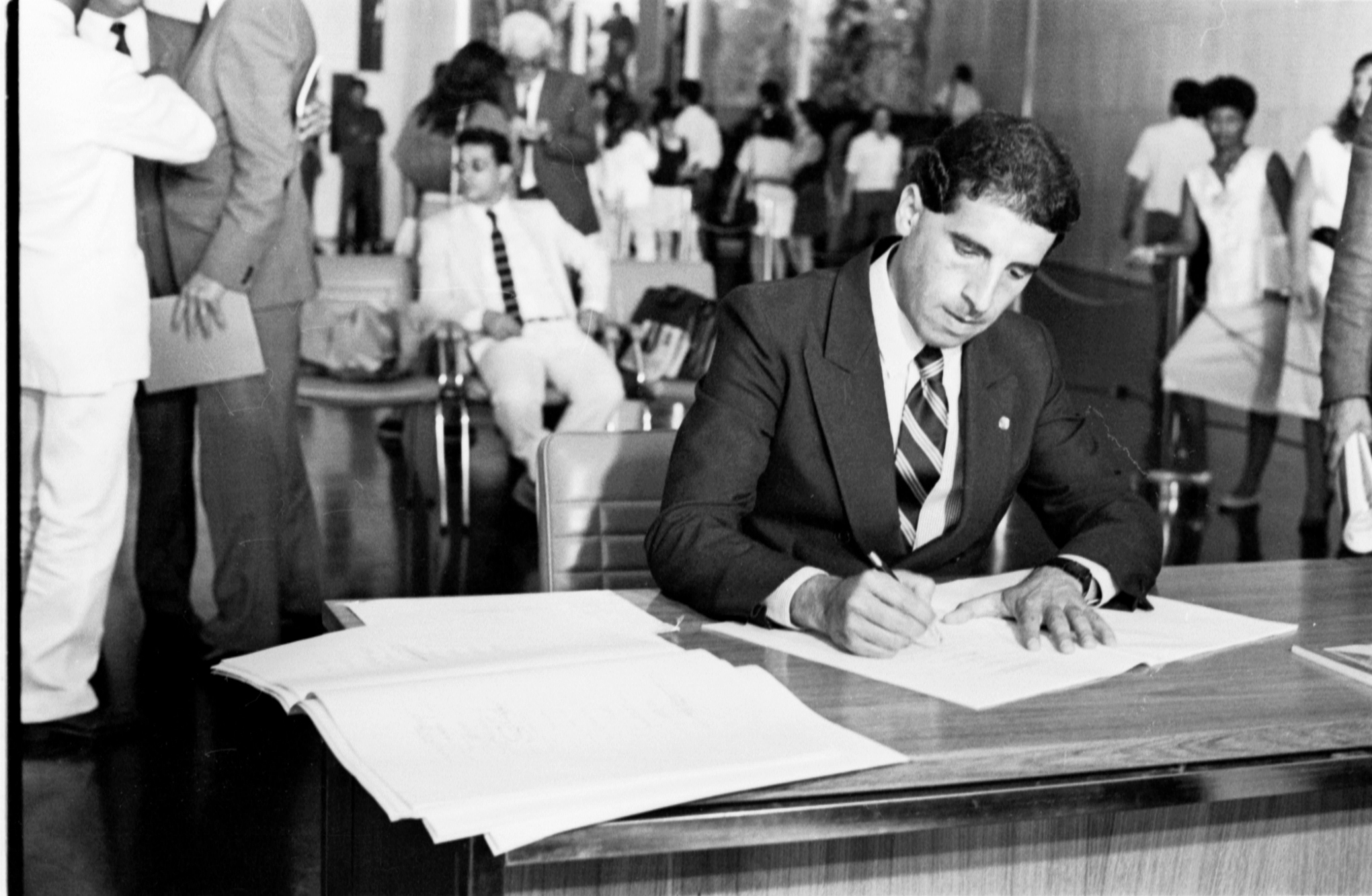 Assinatura da Constituição em 29/09/1988. Participantes - Senador José Fogaça. Foto: Célio Azevedo